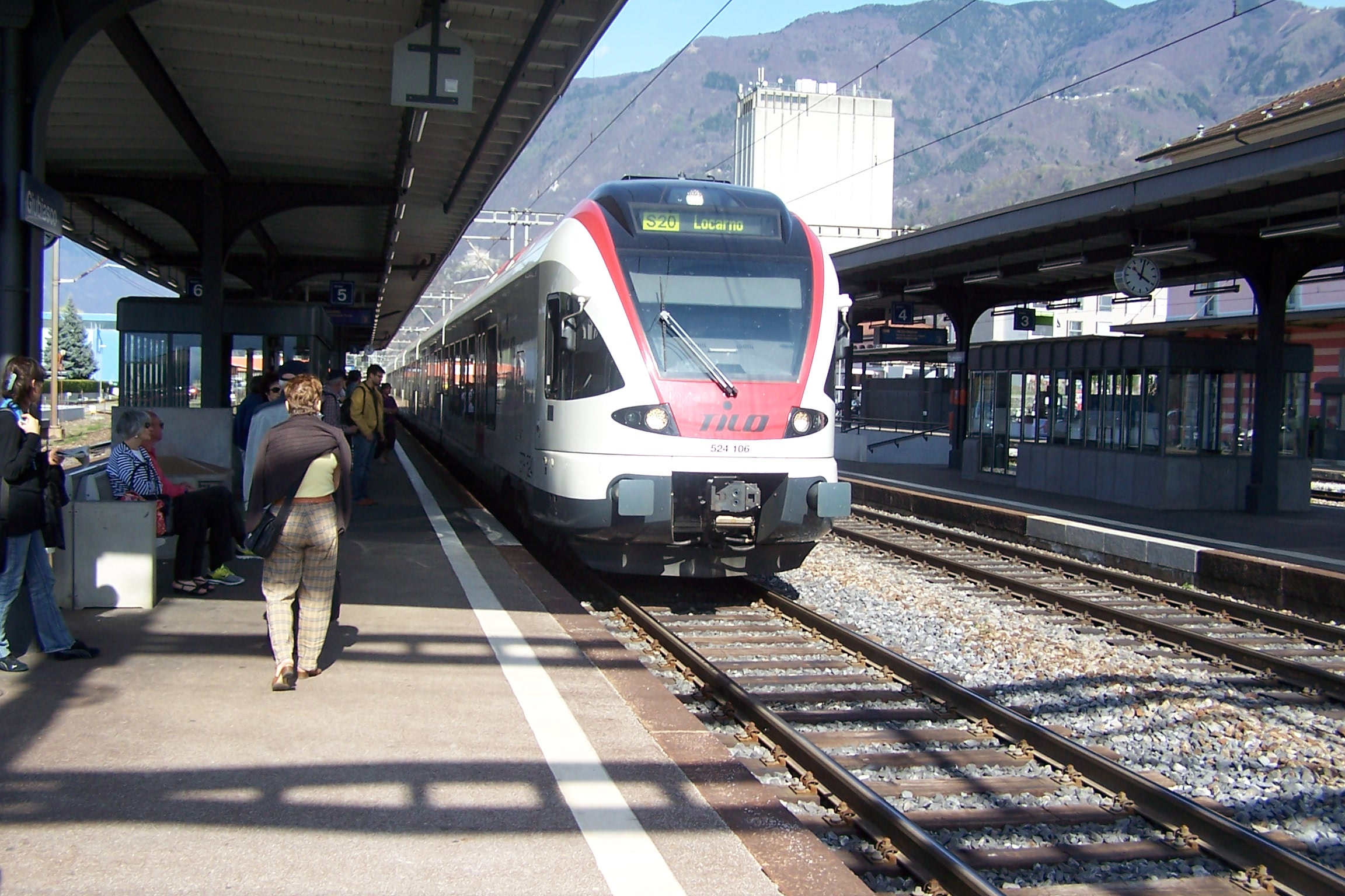 TILO FLIRT 524 106 in Giubiasco